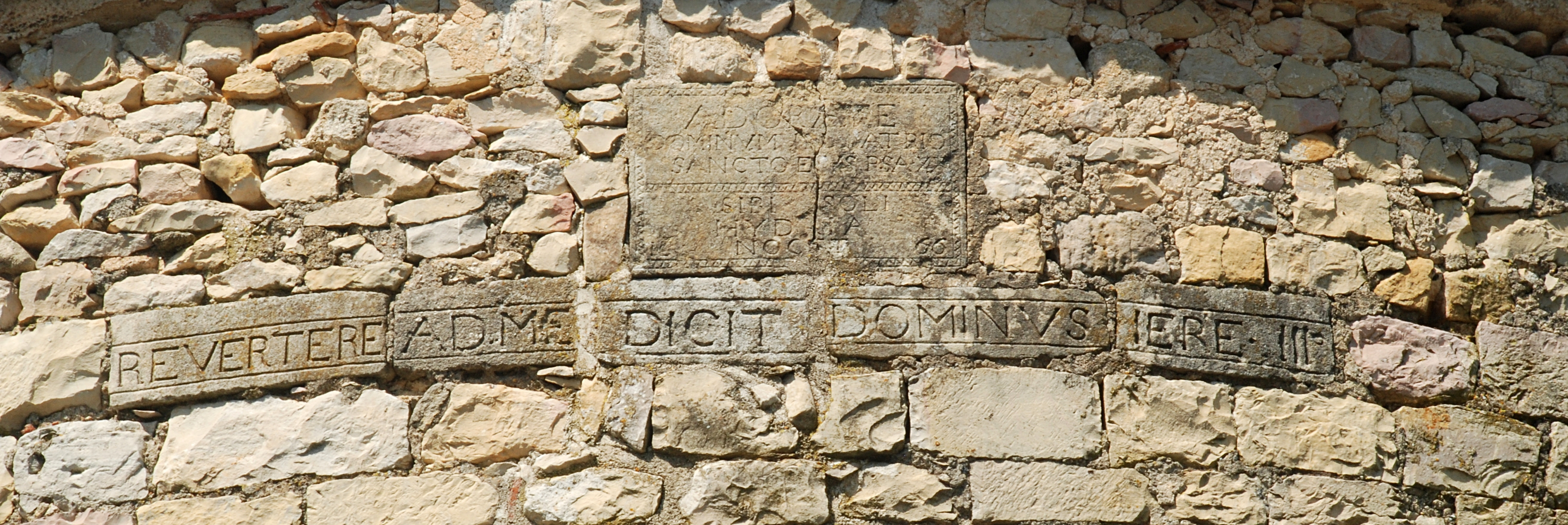 France - Gard - Église de Saint-Étienne d'Escattes